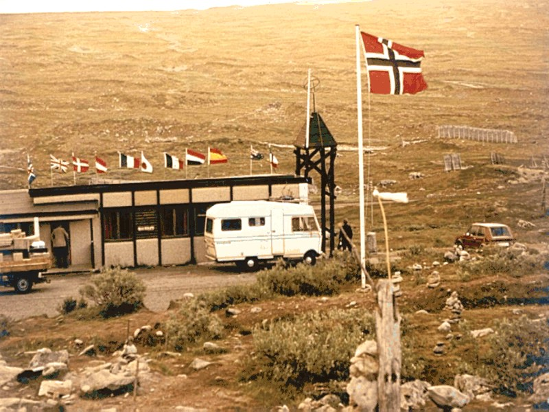 Polarkreis in Norwegen, nahe Mo i Rana Fotograf: presse03, selbst erstellt, 1975 Lizenz: GNU-FDL